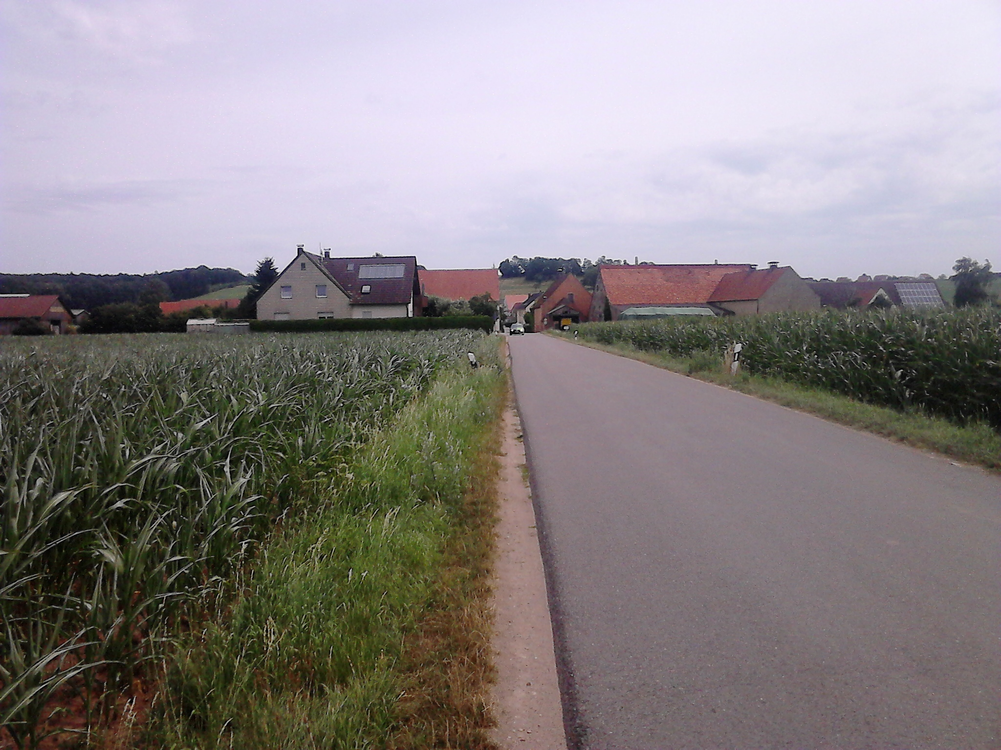 Gundelshalm Westeingang